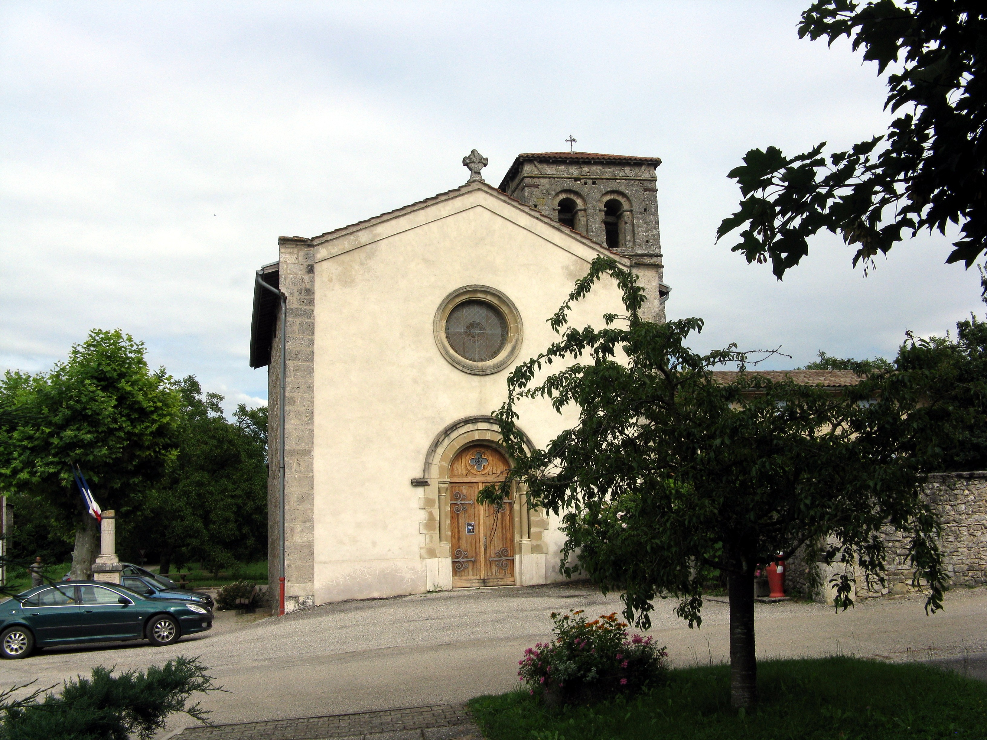 La Motte Fanjas - Eglise